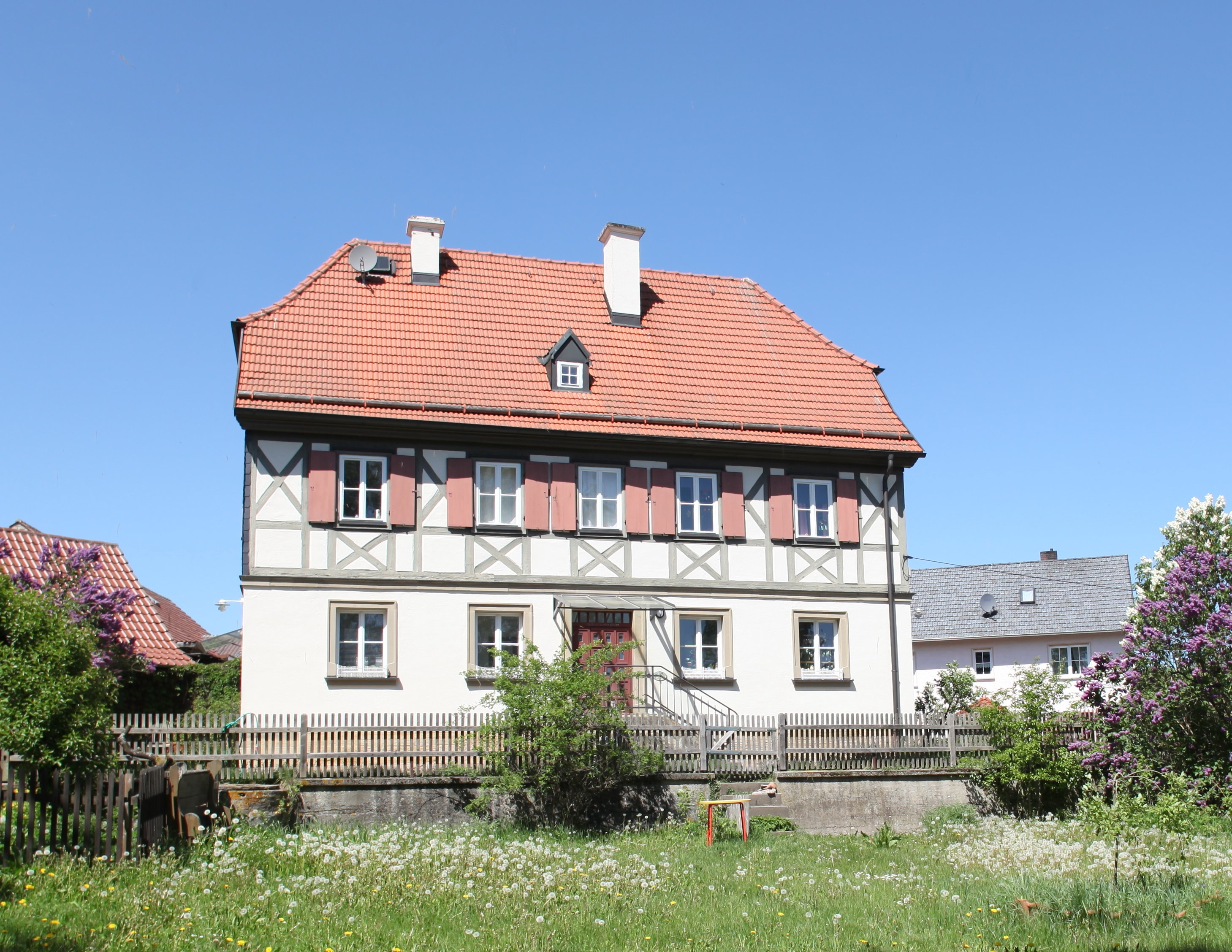 Pfarrhaus 1748, Heldburgplatz 5, Gemünda, Landkreis Coburg